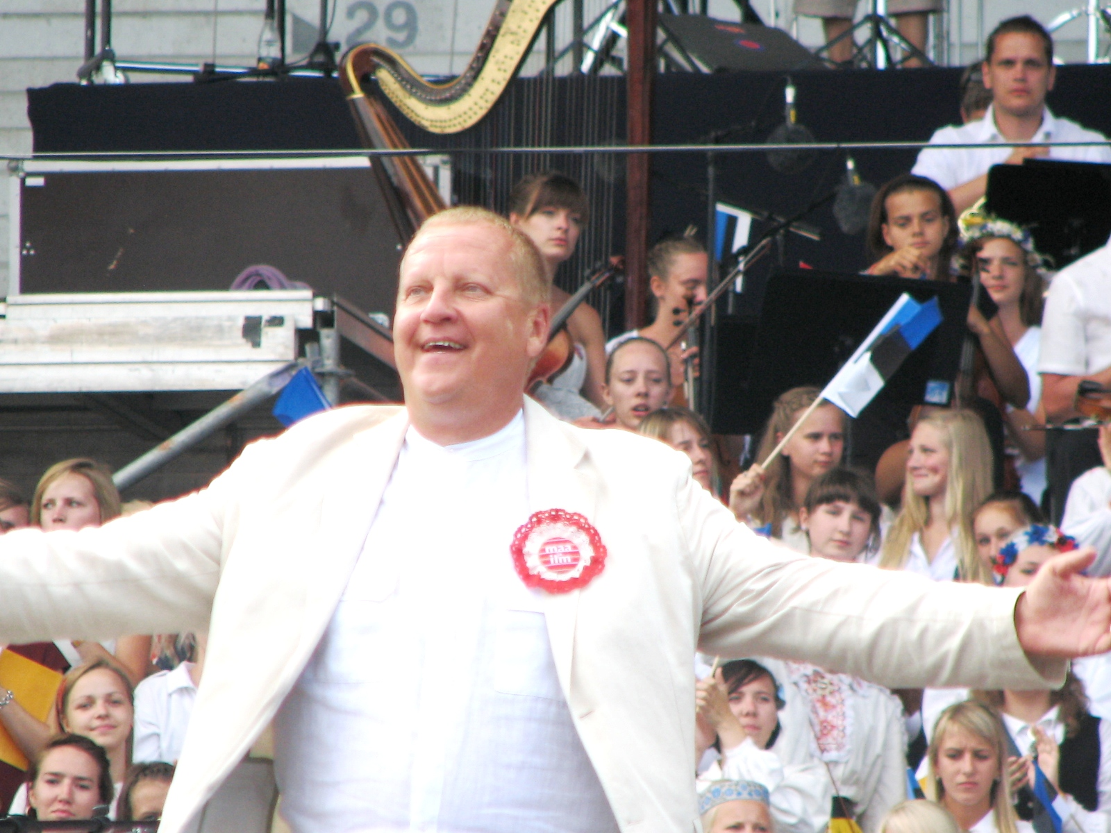 Toomas Voll pärast neidudekoori esitatud "Öölaulu" XI noorte laulu- ja tantsupeol